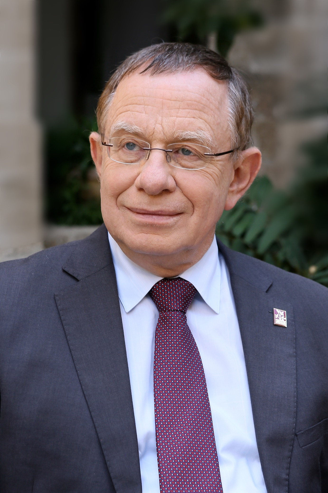 פרופ' רפאל (רפי ) ביאר, מנהל רמב"ם- הקרי הרפואית לבריאות האדם